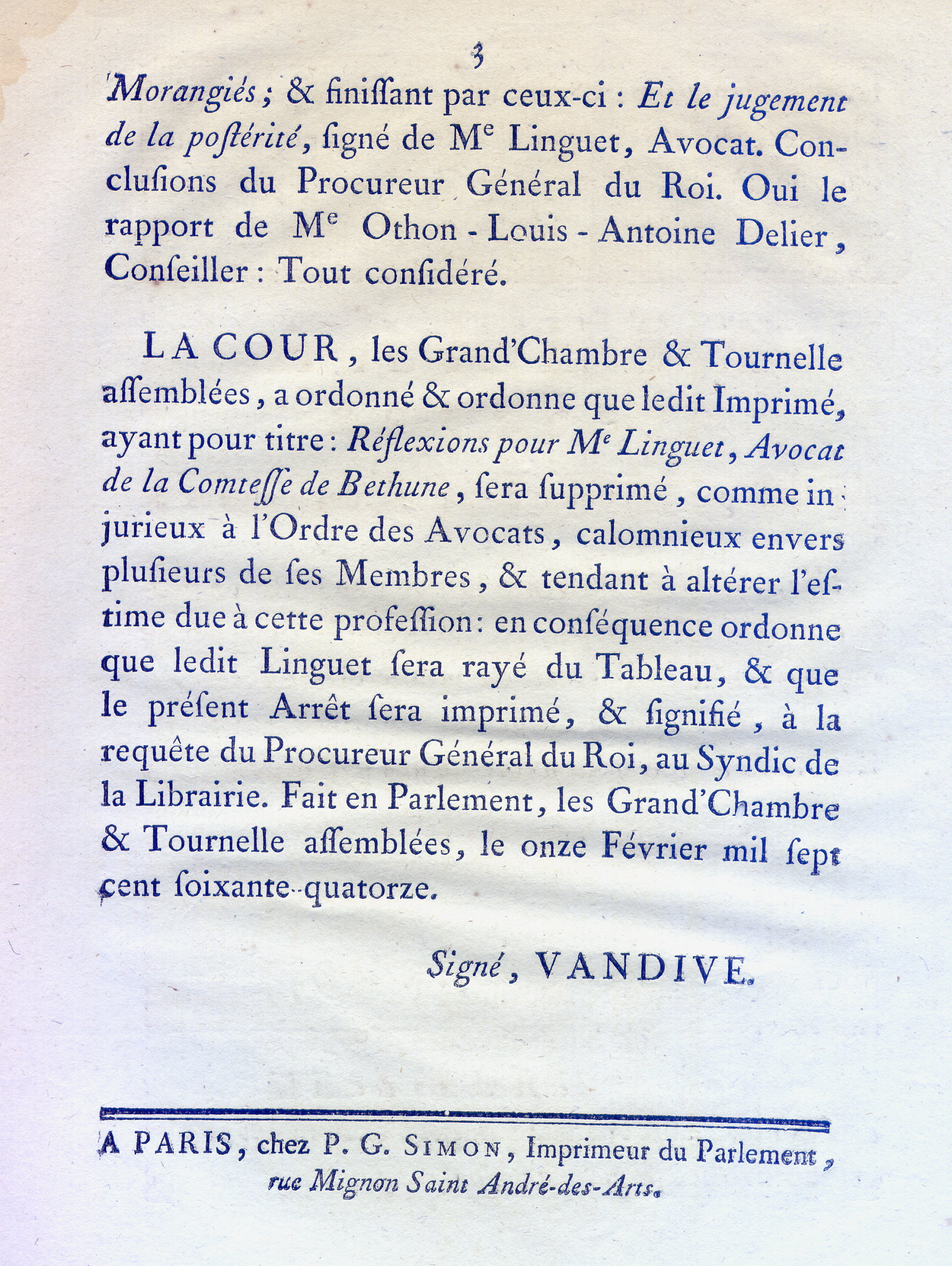 Arrest de la Cour du Parlement qui supprime un libelle de Linguet et le raye du Tableau, 11 février 1774, signé Nicolas Félix Vandive, page 3/3. Avocat général Jacques de Vergès